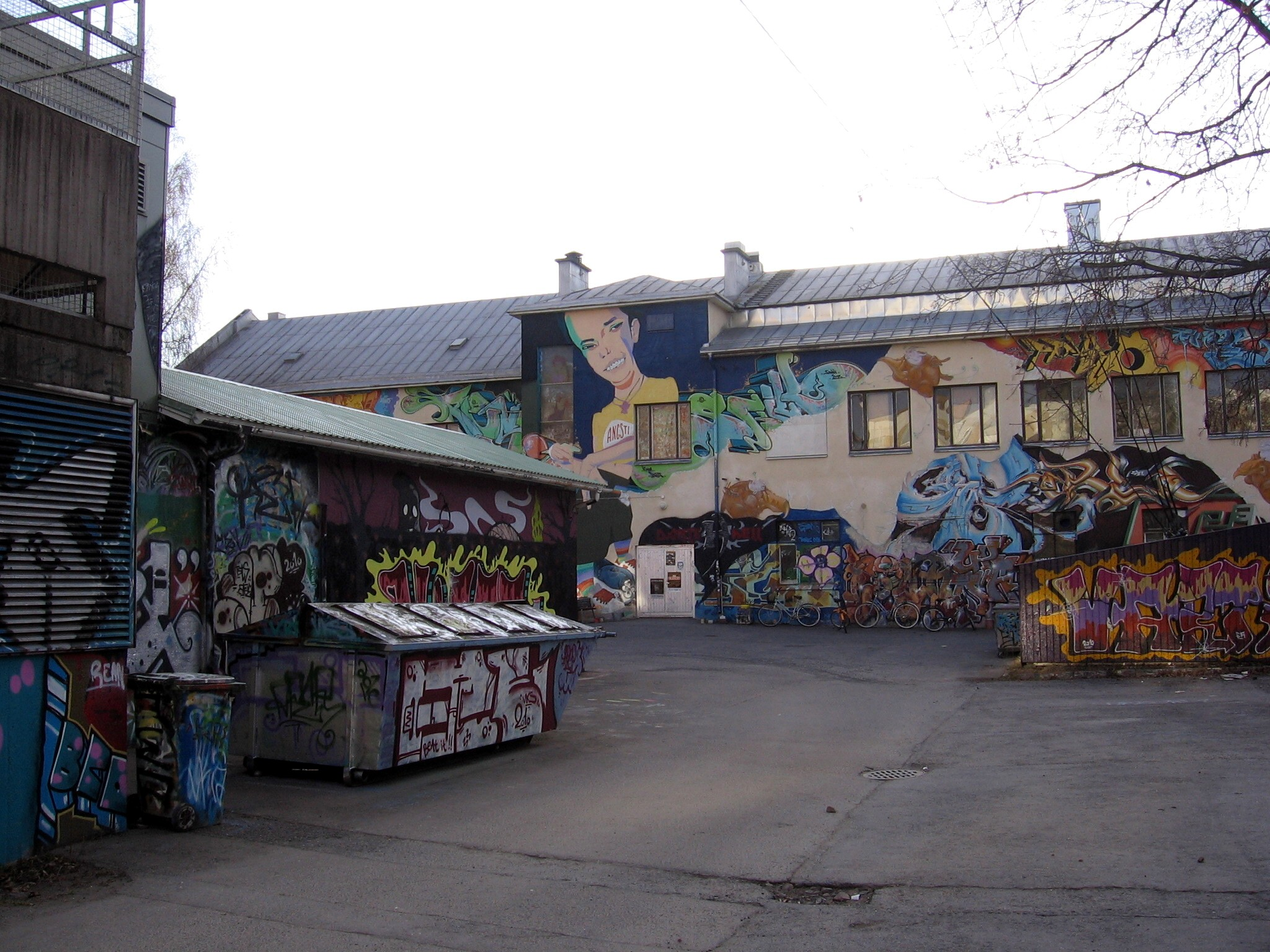 Annankatu 6 (Pori)